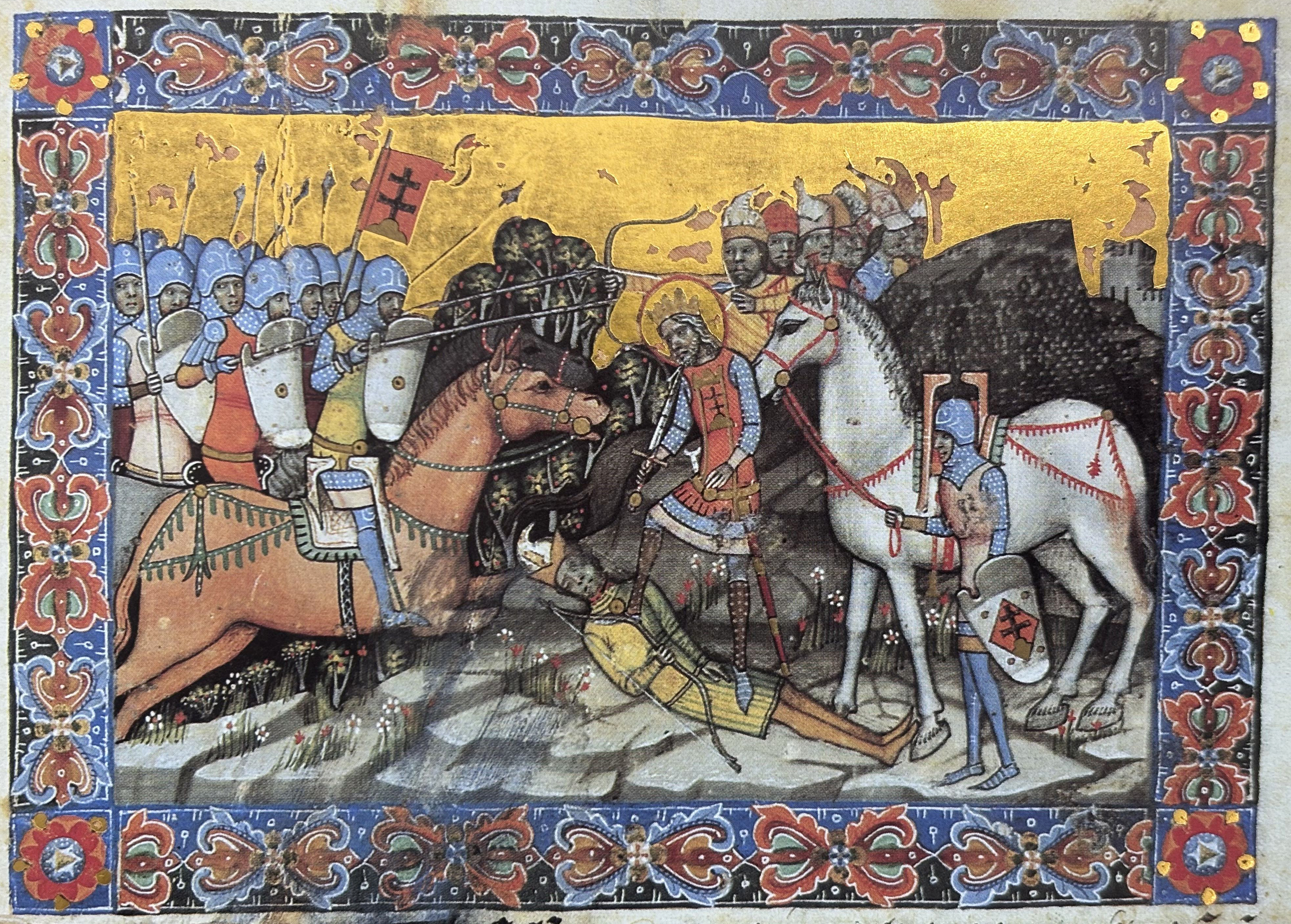 Stephen I defeats Keane